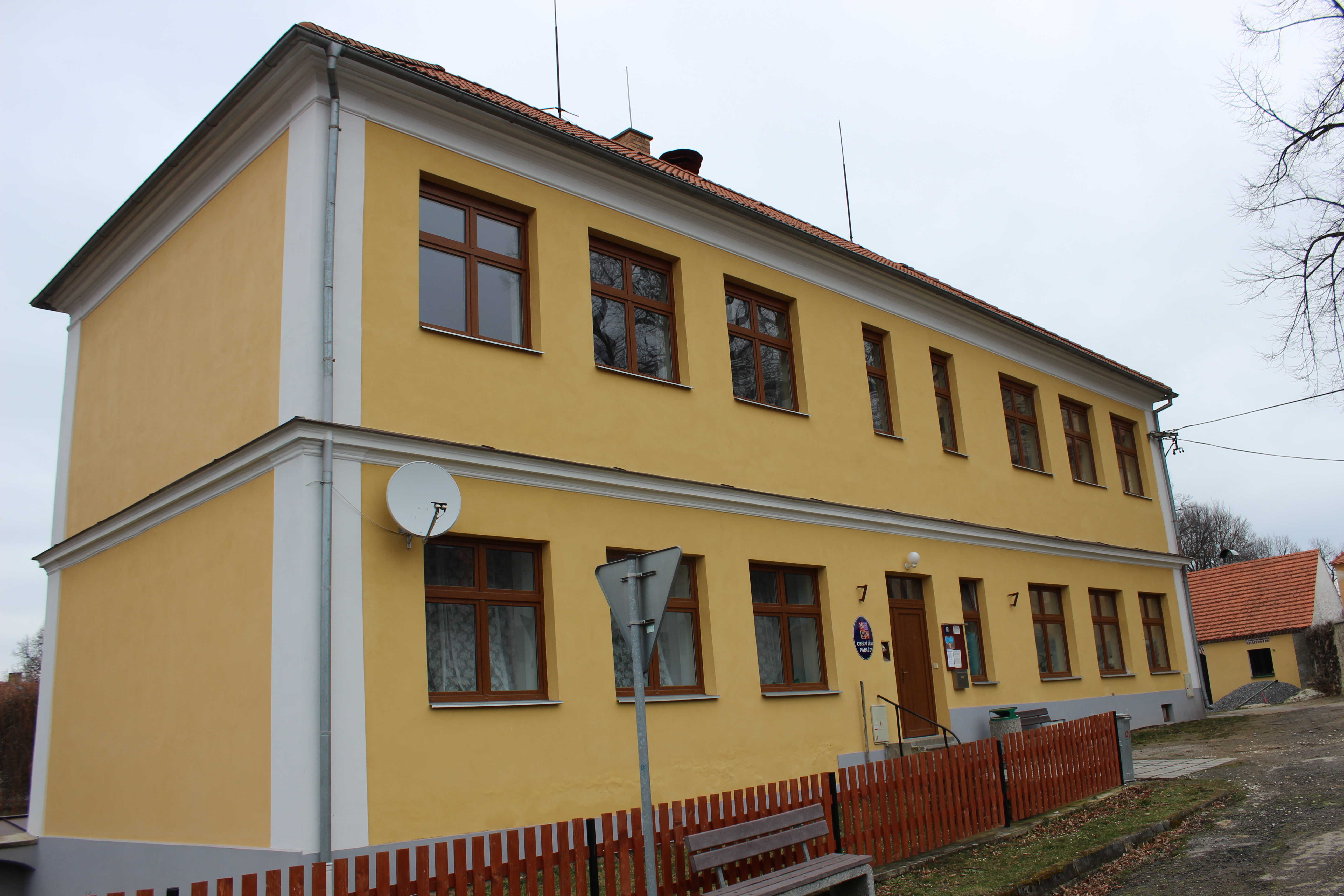 Obecní úřad. Paračov v okrese Strakonice, kraj Jihočeský,Česká republika.